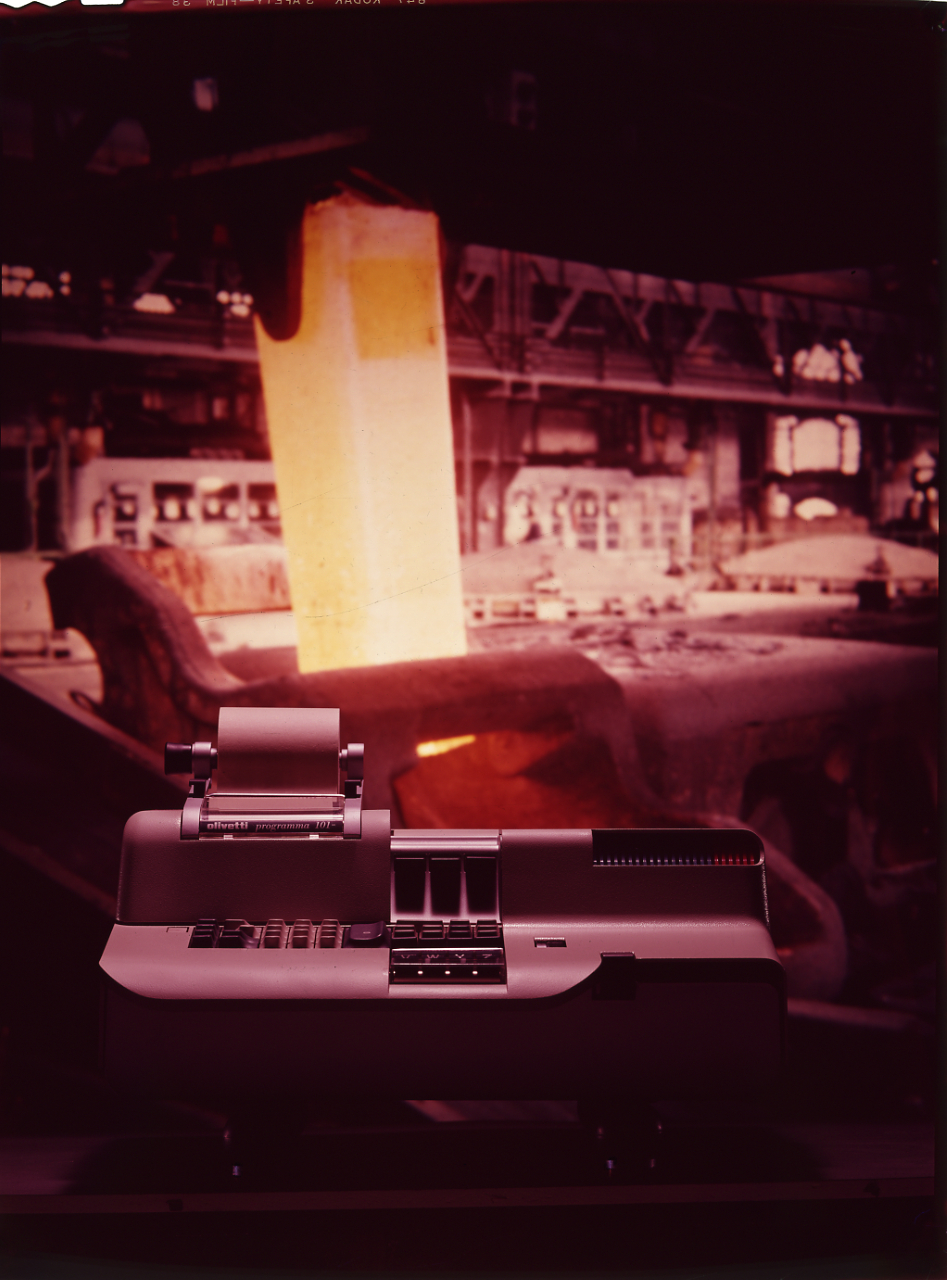 Servizio fotografico : Italia, 1968 / Paolo Monti. - Buste: 1, Fototipi: 1 : Diapositiva, sviluppo cromogeno/ pellicola ; 18x24. - ((Serie costituita da 1 busta sciolta di diapositiva identificata con il n.: 1154. - La suddetta serie è contenuta nella scatola GGC1126-1154, formato 18x24. - Alla fine del 1964 nasce "Programma 101", il calcolatore elettronico da tavolo chiamato anche Perottina o P101. - Fonte: Rubrica di Paolo Monti: Archivio 10x12 (ultimi numerati) - dal G1 al (s.d.), presso Archivio Paolo Monti